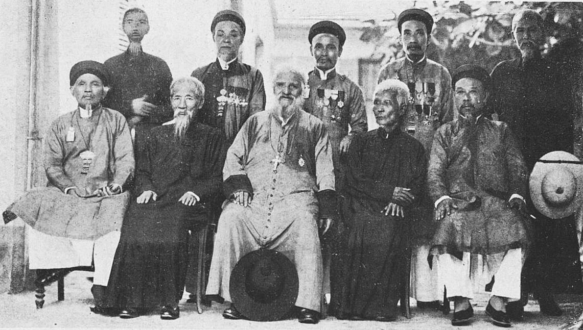 Mgr Gendreau entouré de mandarins catholiques et de prêtres autochtones.